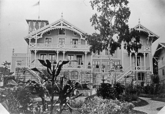 Molde, Villa Retiro.